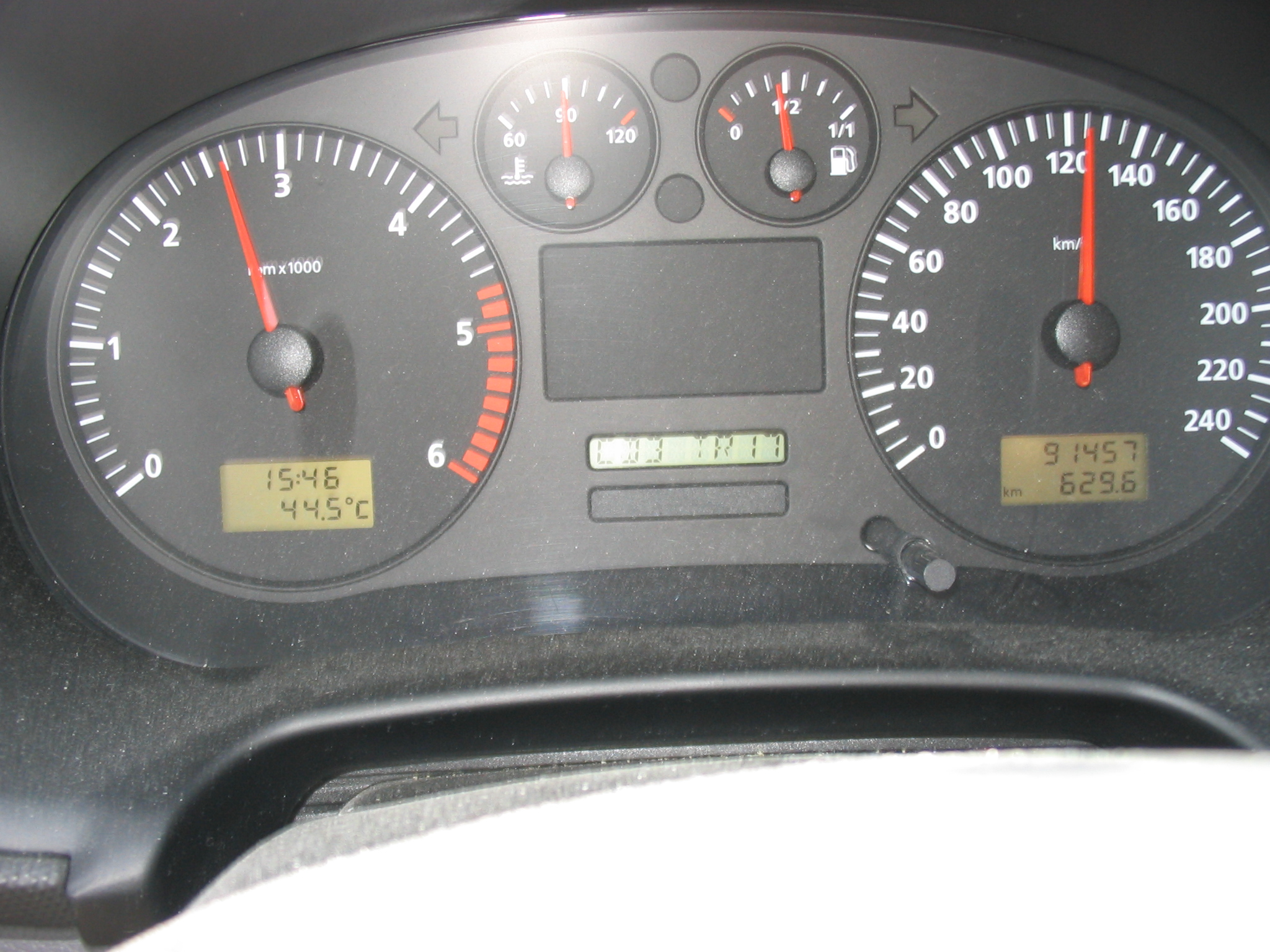 SEAT Leon/Toledo 1M Una muestra de calorcito del día: 44,5ºC a las 15:46 y con el vehículo en movimiento...